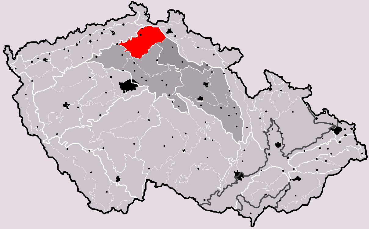 Poloha geomorfologického celku Ralská pahorkatina v rámci České republiky. Hercynský systém Hercynská pohoří I Česká vysočina I6 (VI) Česká tabule I6A (VIA) Severočeská tabule I6A-1 (VIA-1) Ralská pahorkatina